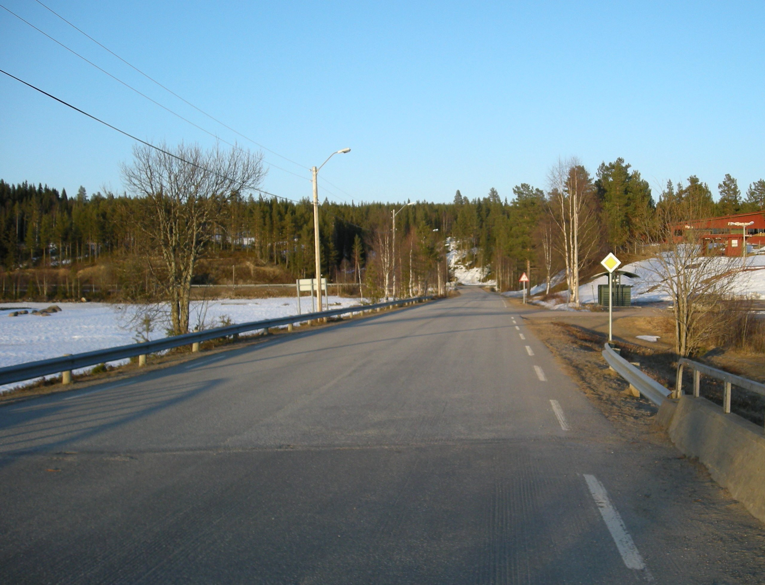 Fylkesvei 561 nær utløpet av Osensjøen (Trysil kommune, Hedmark)